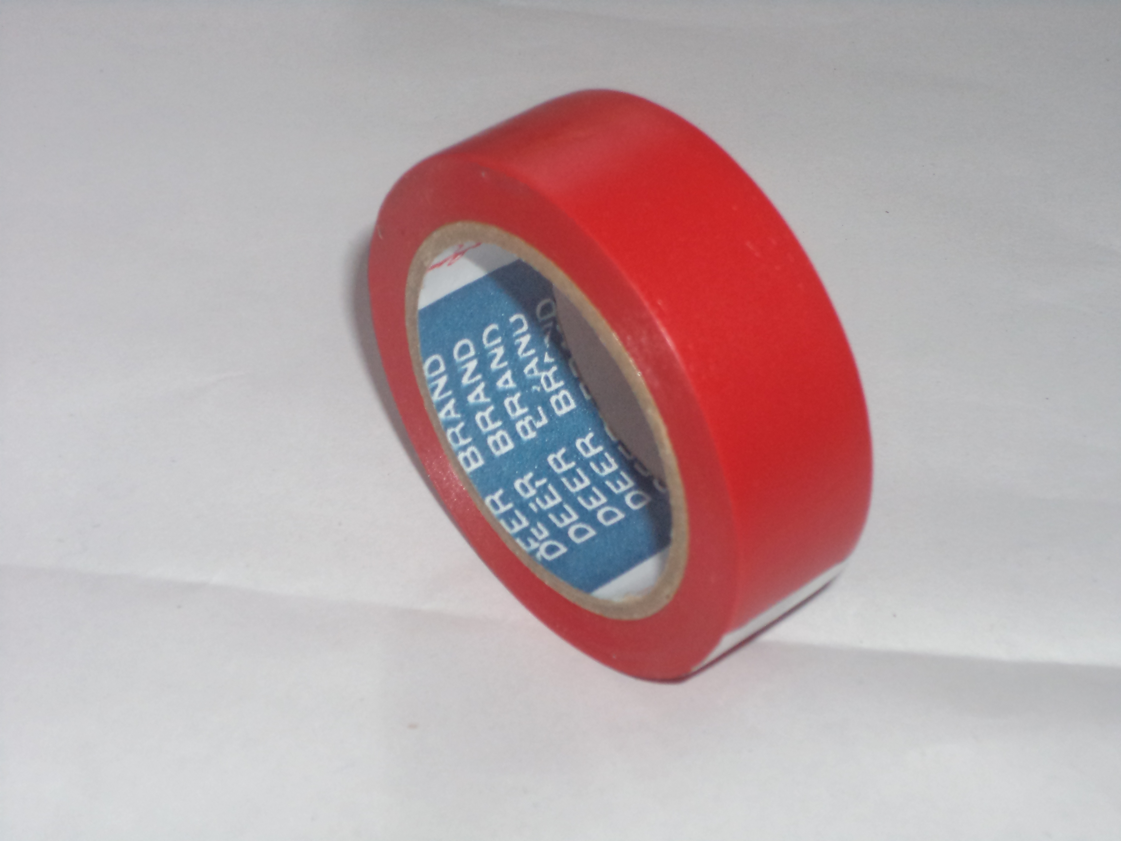 மின்சாரக்கம்பி இணைப்புகளில் பயன்படும் மின்கடத்தா ஒட்டு நாடா